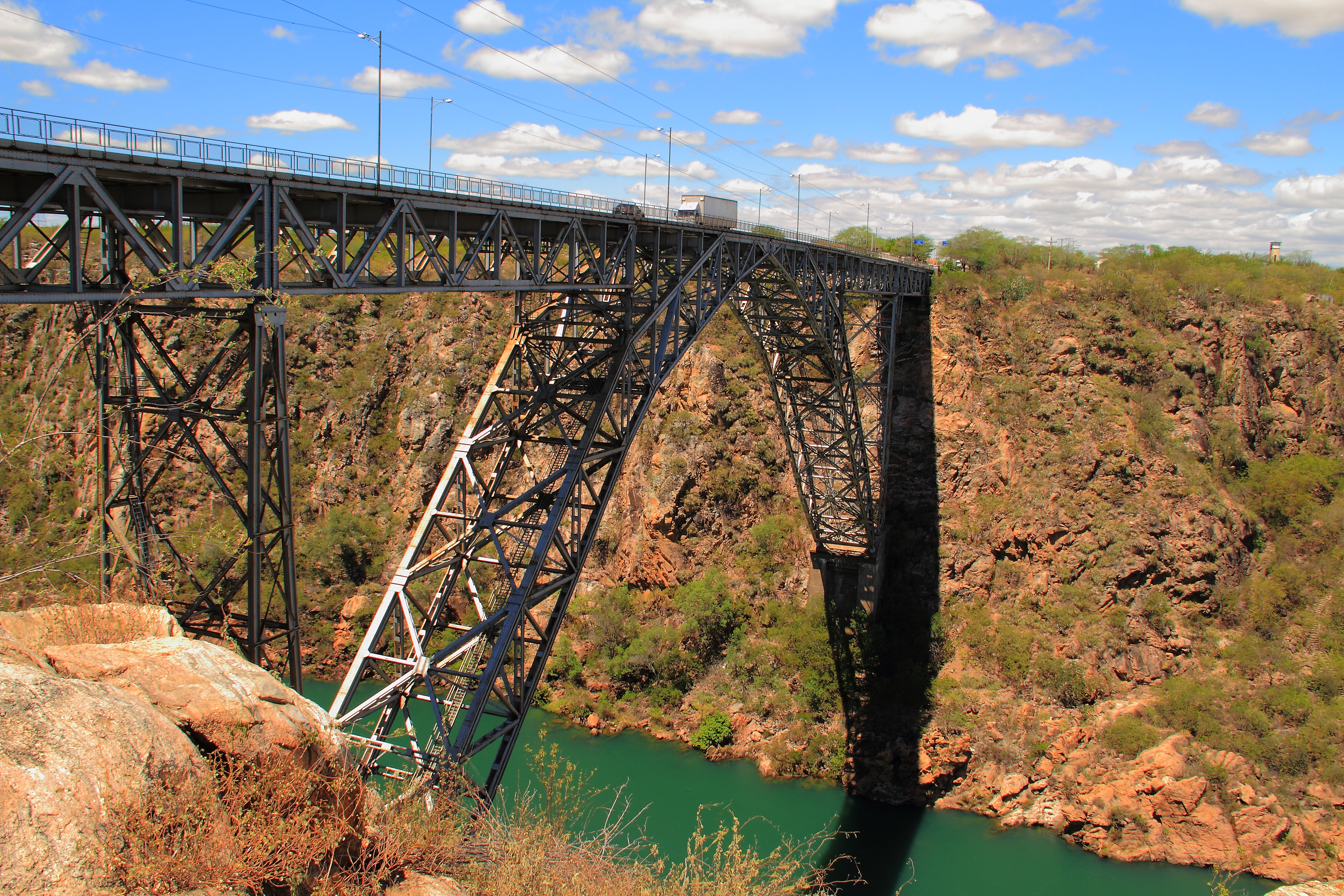 Ponte que faz a divisa entre os Estados de Alagoas e Bahia.